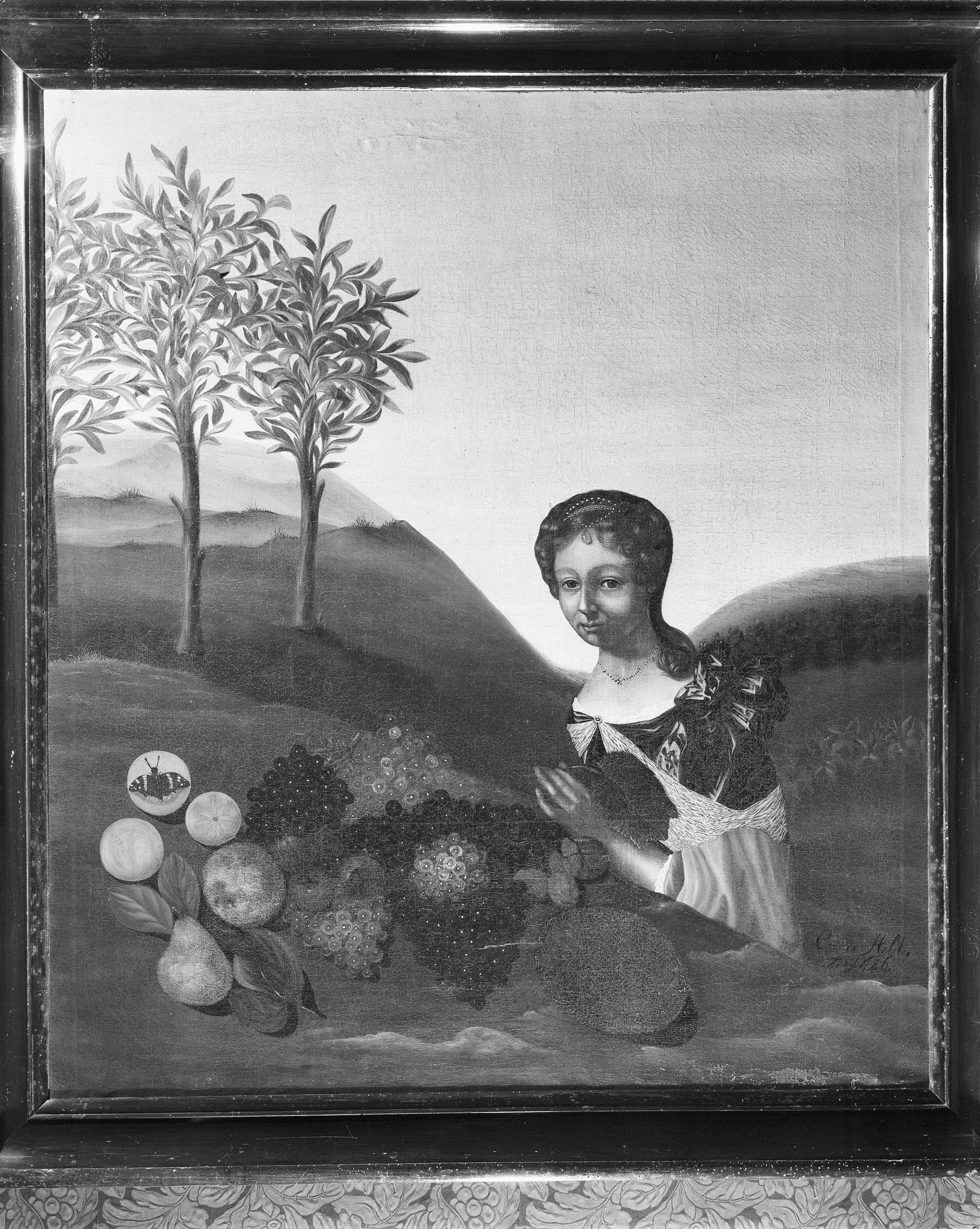 Vrouwenhuis: schilderij Portret van een jonge vrouw met vruchtenstilleven in een landschap, vermoedelijk een zelfportret This tag does not indicate the copyright status of the attached work. A normal copyright tag is still required. See Commons:Licensing.